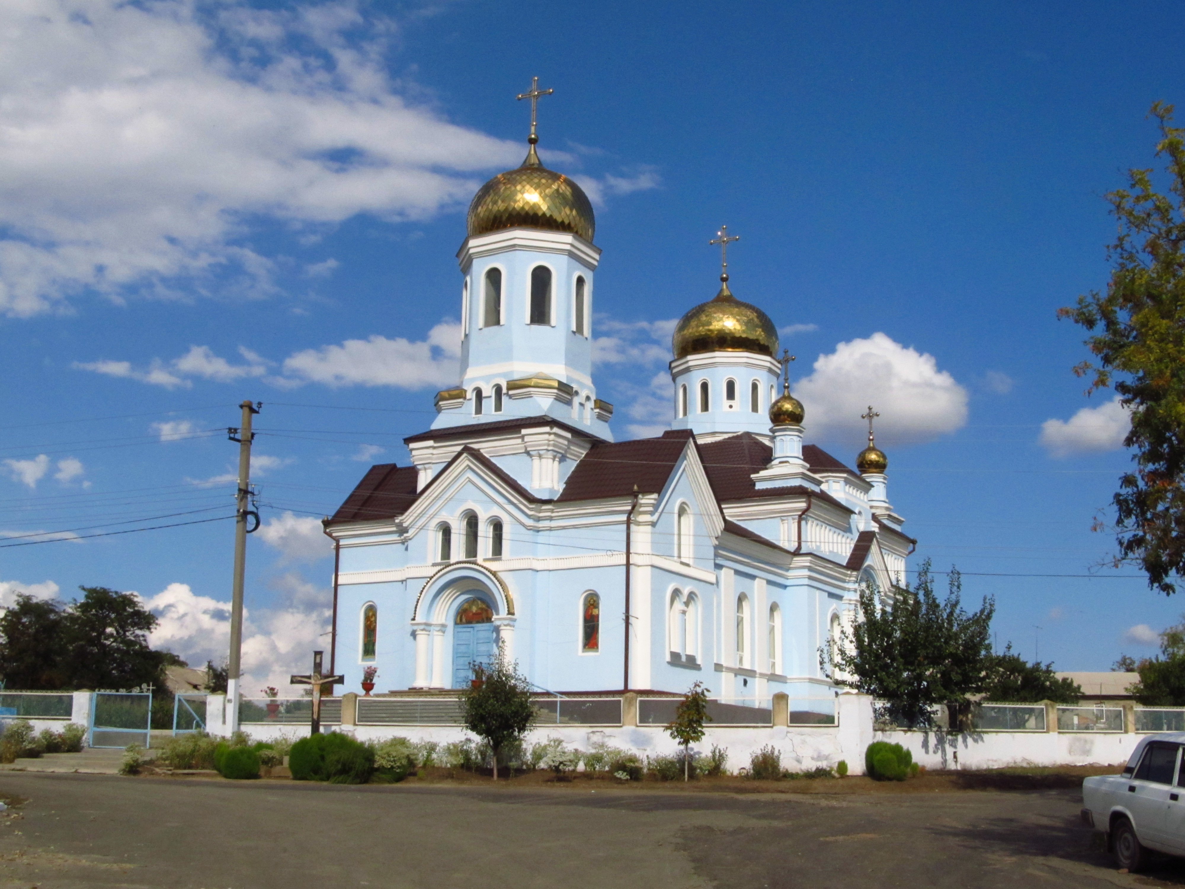 Церква, Ренійський район, с. Котловина